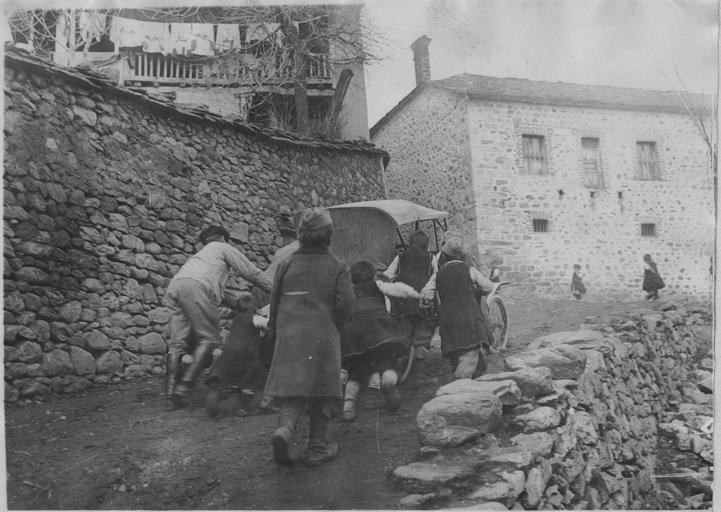 Village of Kladorobi or Kladorohi, Greece